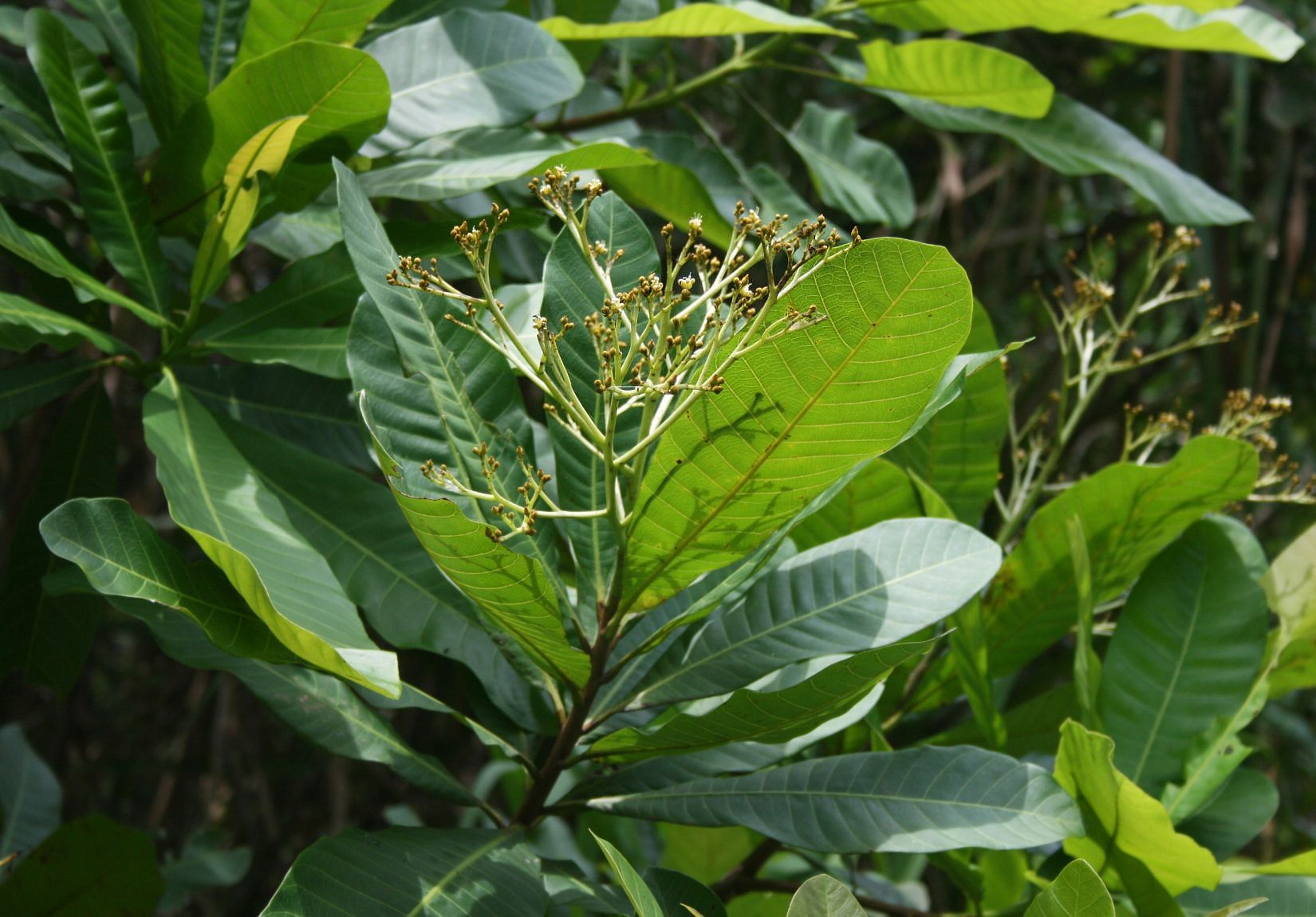 Anacardium excelsum, Sumachgewächse (Anacardiaceae) - Costa Rica: Prov. Puntarenas, La Gamba NW Golfito, Valle Bonito